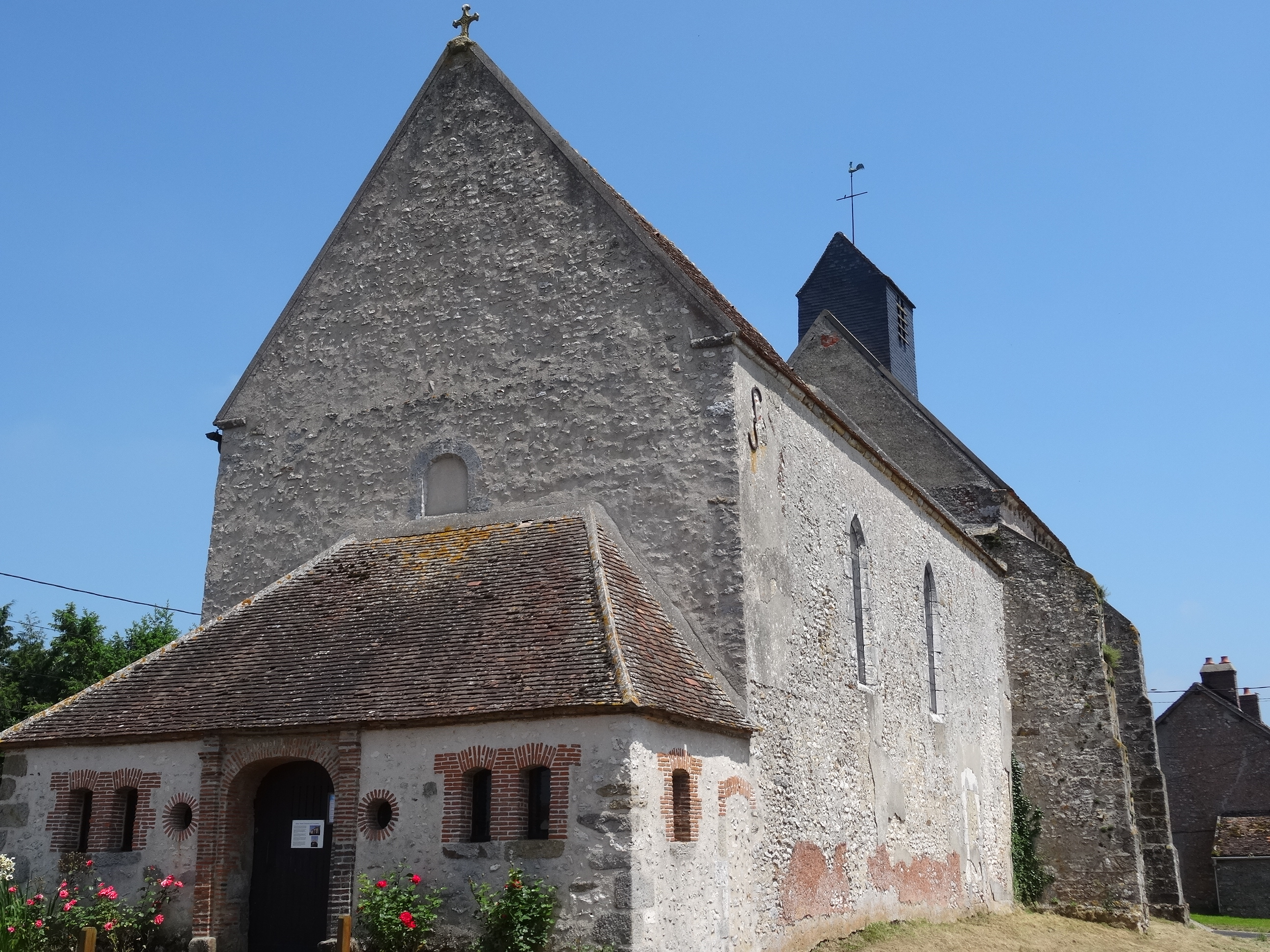 Église Sainte-Geneviève de Cucharmoy. (Seine-et-Marne, région Île-de-France).